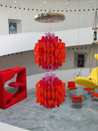 Trapholt Kunstmuseum. Et mini Guggenheim med en rotunde eller spiral. Møbler af Verner Panton og Nanna Ditzel